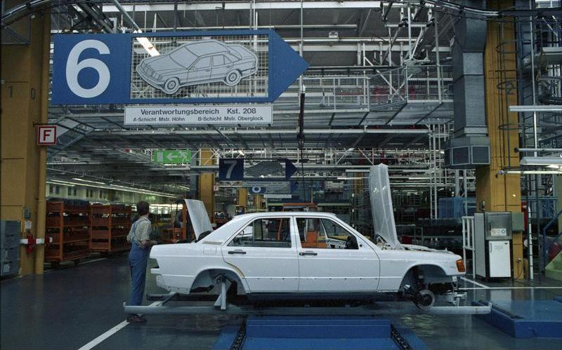 Juni 1988 Stuttgart-Untertürkheim, Daimler-Benz-Werk